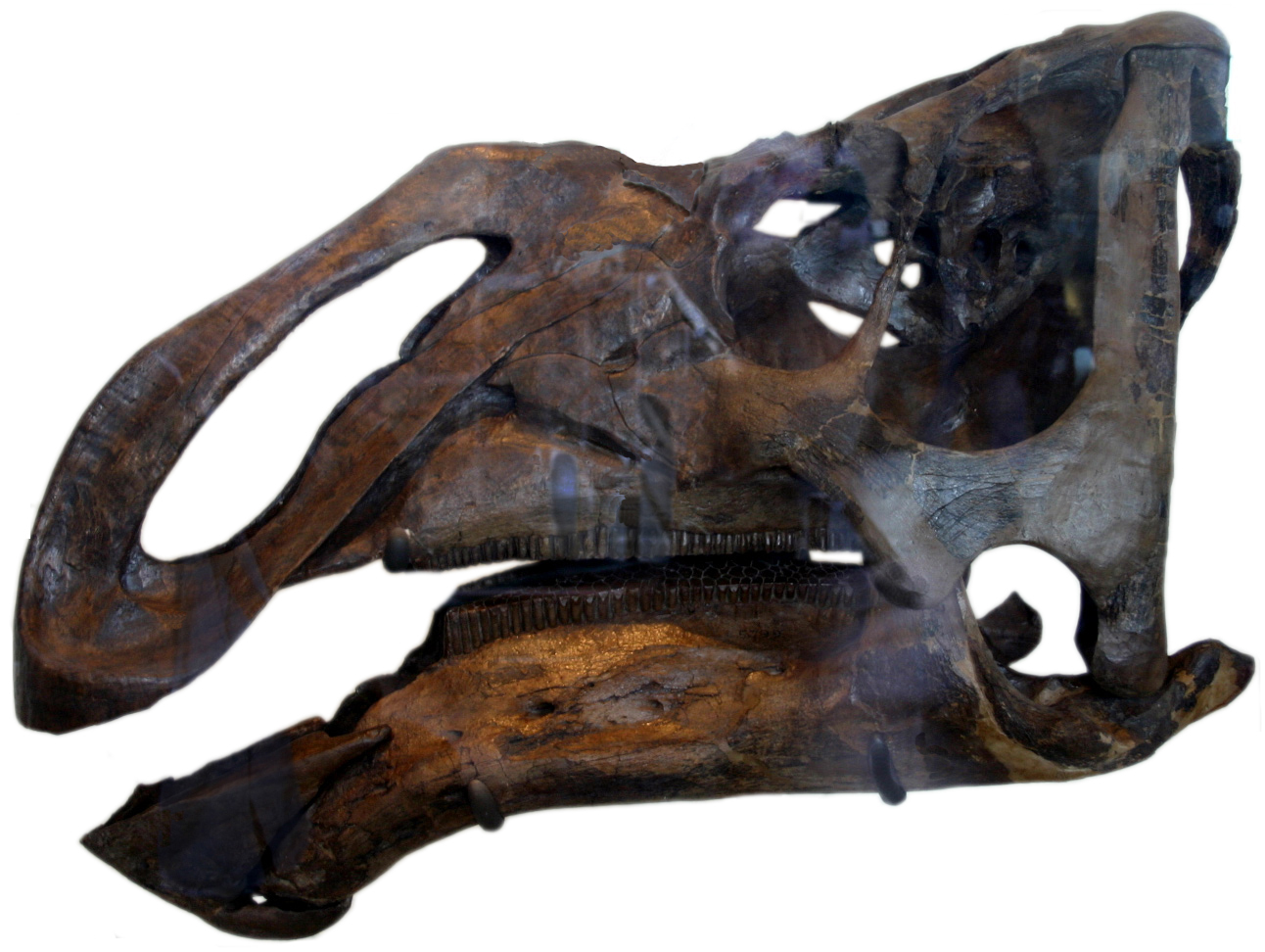 Kritosaurus navajovius skull